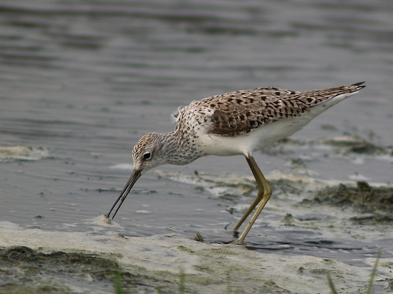 Tringa stagnatilis（小青足鷸）, Changhua County, Taiwan, 2007